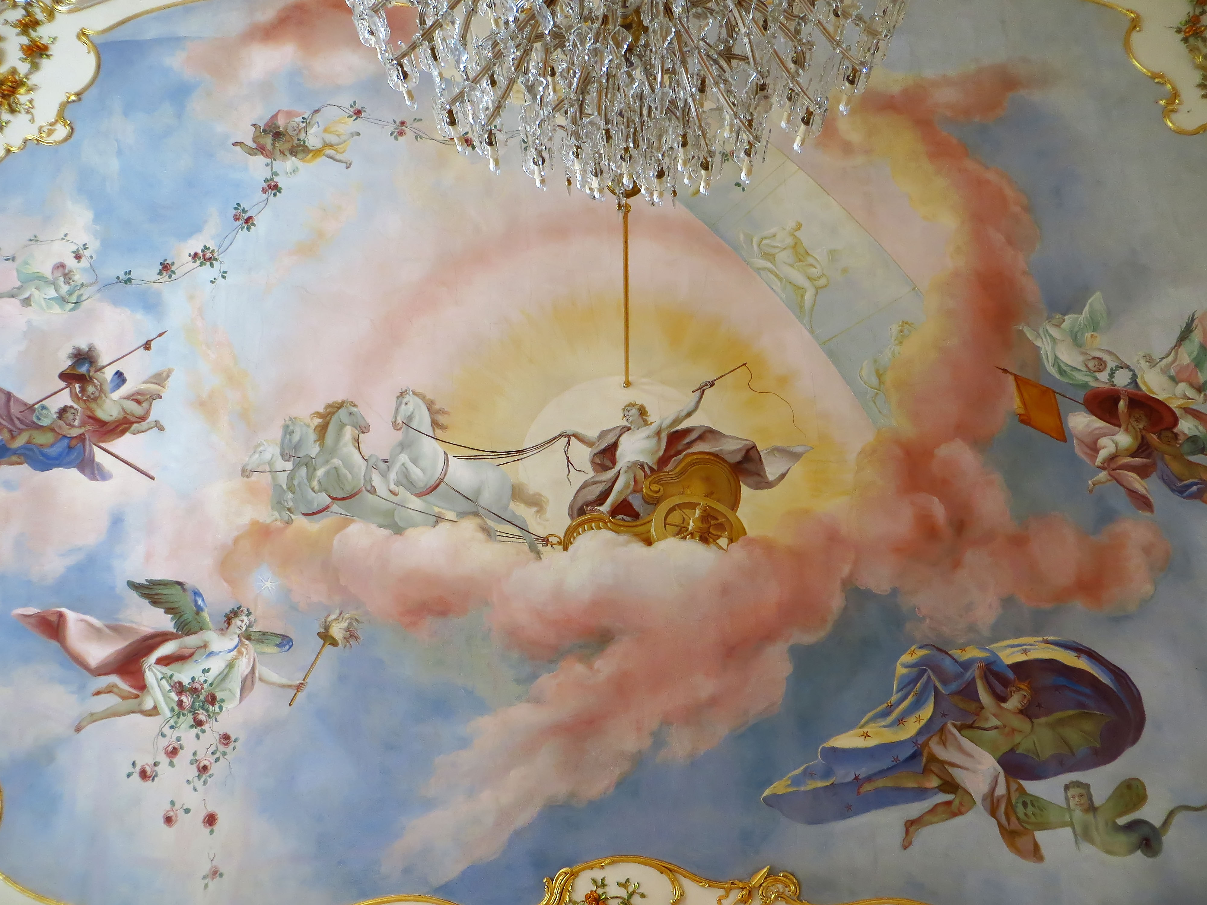 Esterházy-kastély – kastély This is a photo of a monument in Hungary, Identifier: 4051